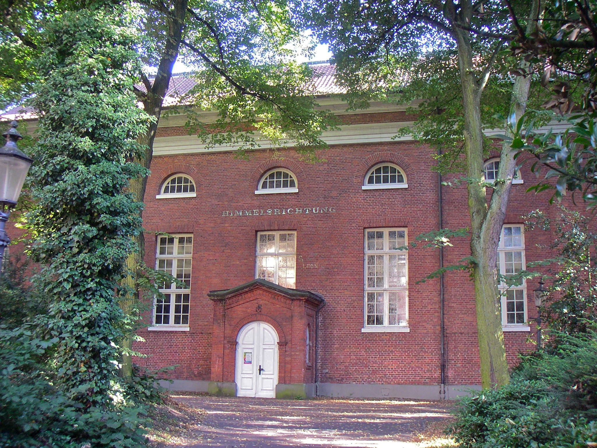 Hamburg, Kirche St. Pauli, Altona-Altstadt, Nordeingang